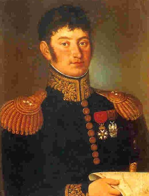 portrait du Général Pierre Decouz, baron de l'Empire